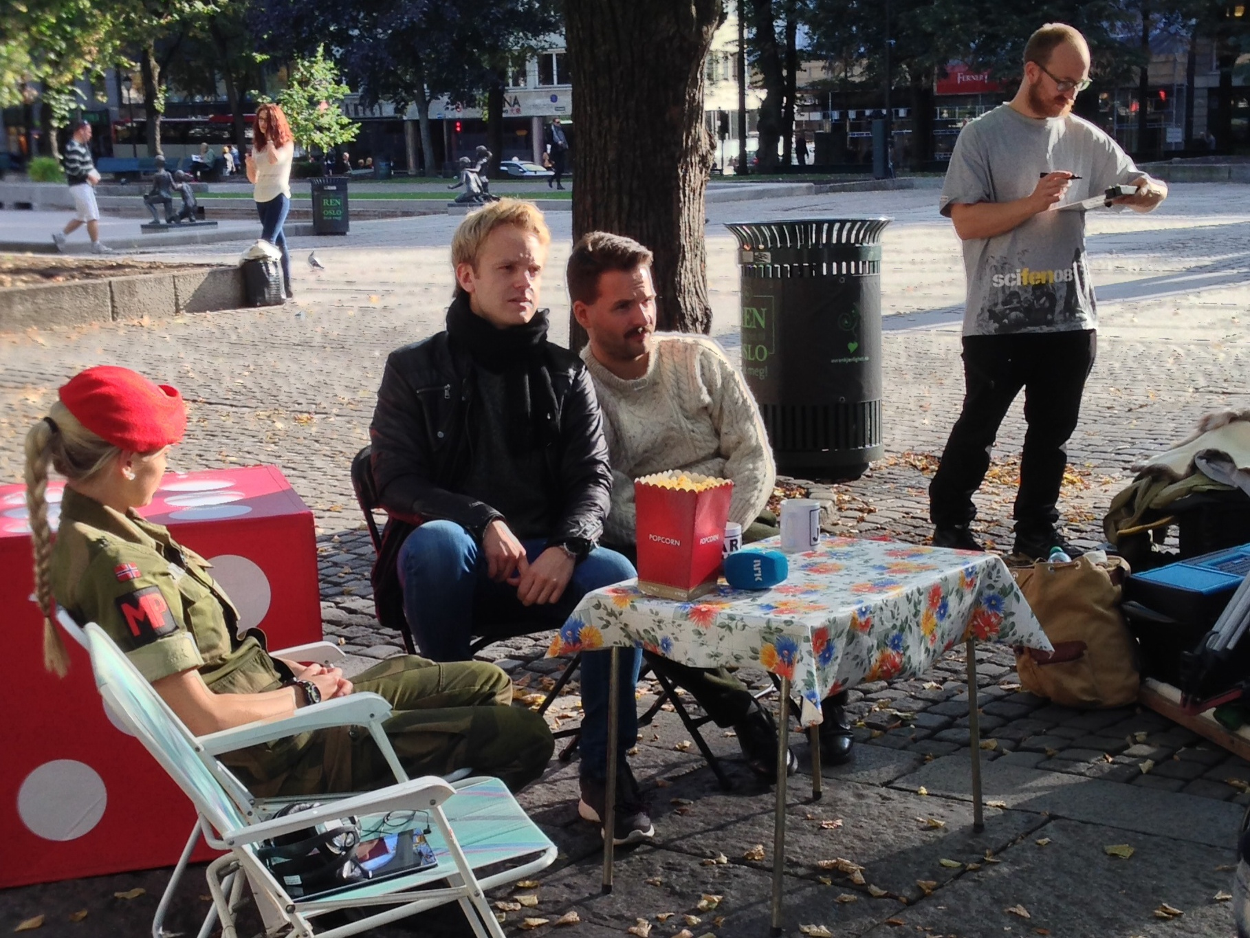 Bilde fra innspillingen av den norske TV-serien "Karl Johan", med Erik Solbakken og Hasse Hope.